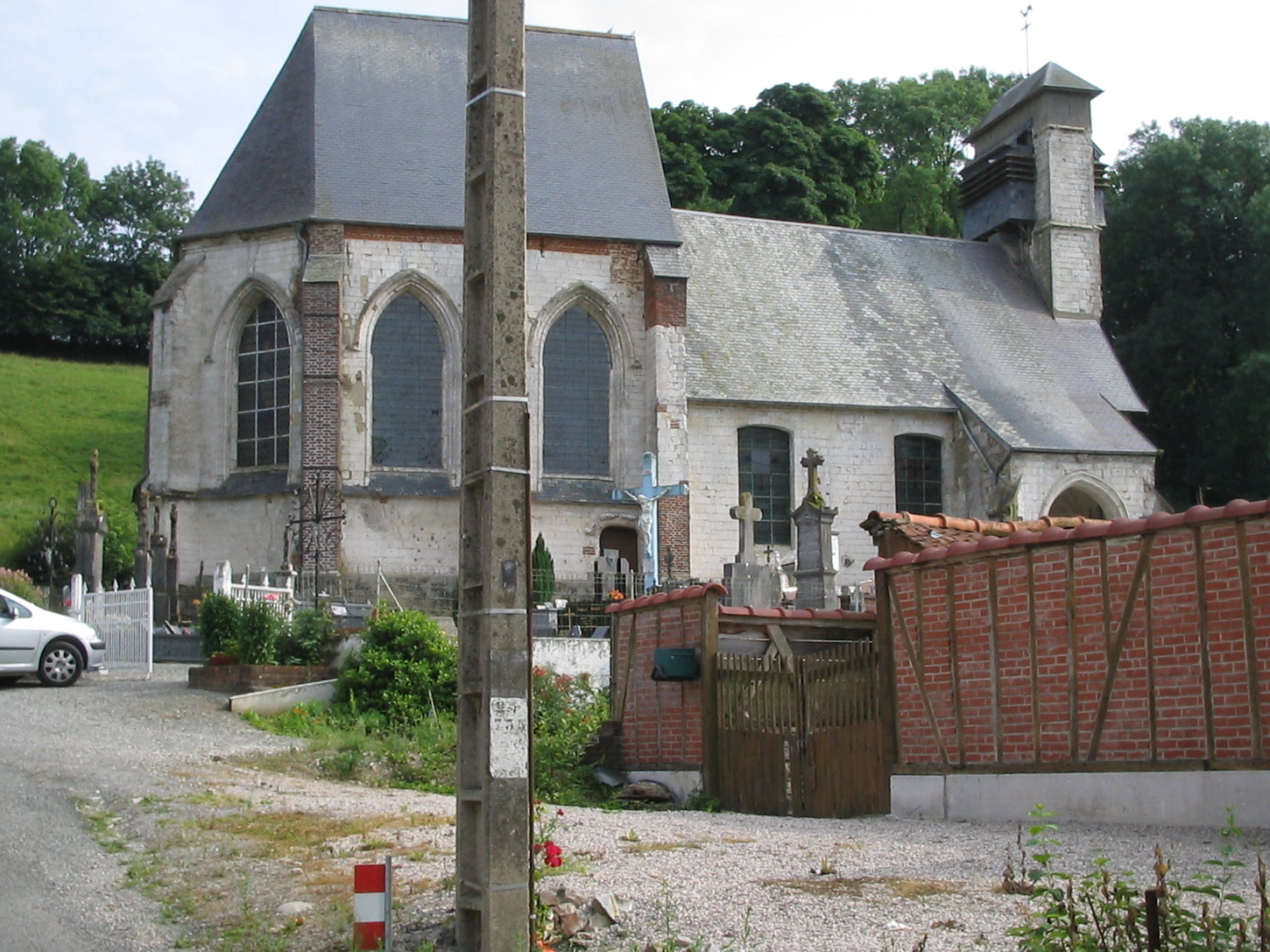 Photo de l'église de Planques, Pas-de-Calais, en 2005.